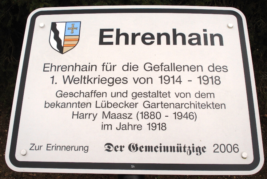 Tafel am Ehrenhain in Bad Schwartau